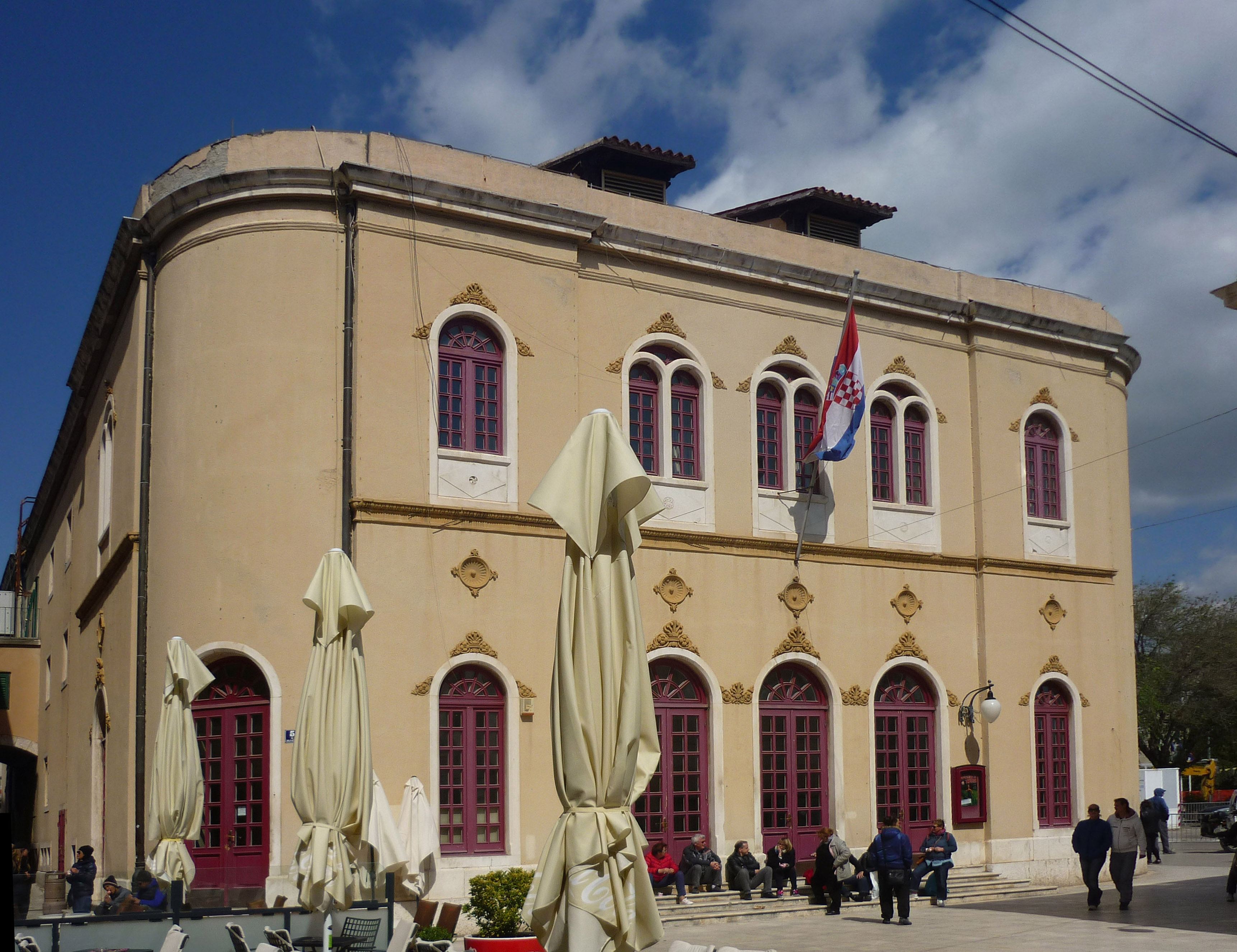 Theater in Šibenik (dt.: Sibenning, ital.: Sebenico)